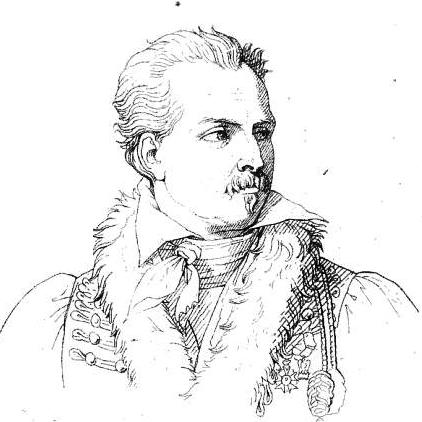 Le baron Pierre Boyer.